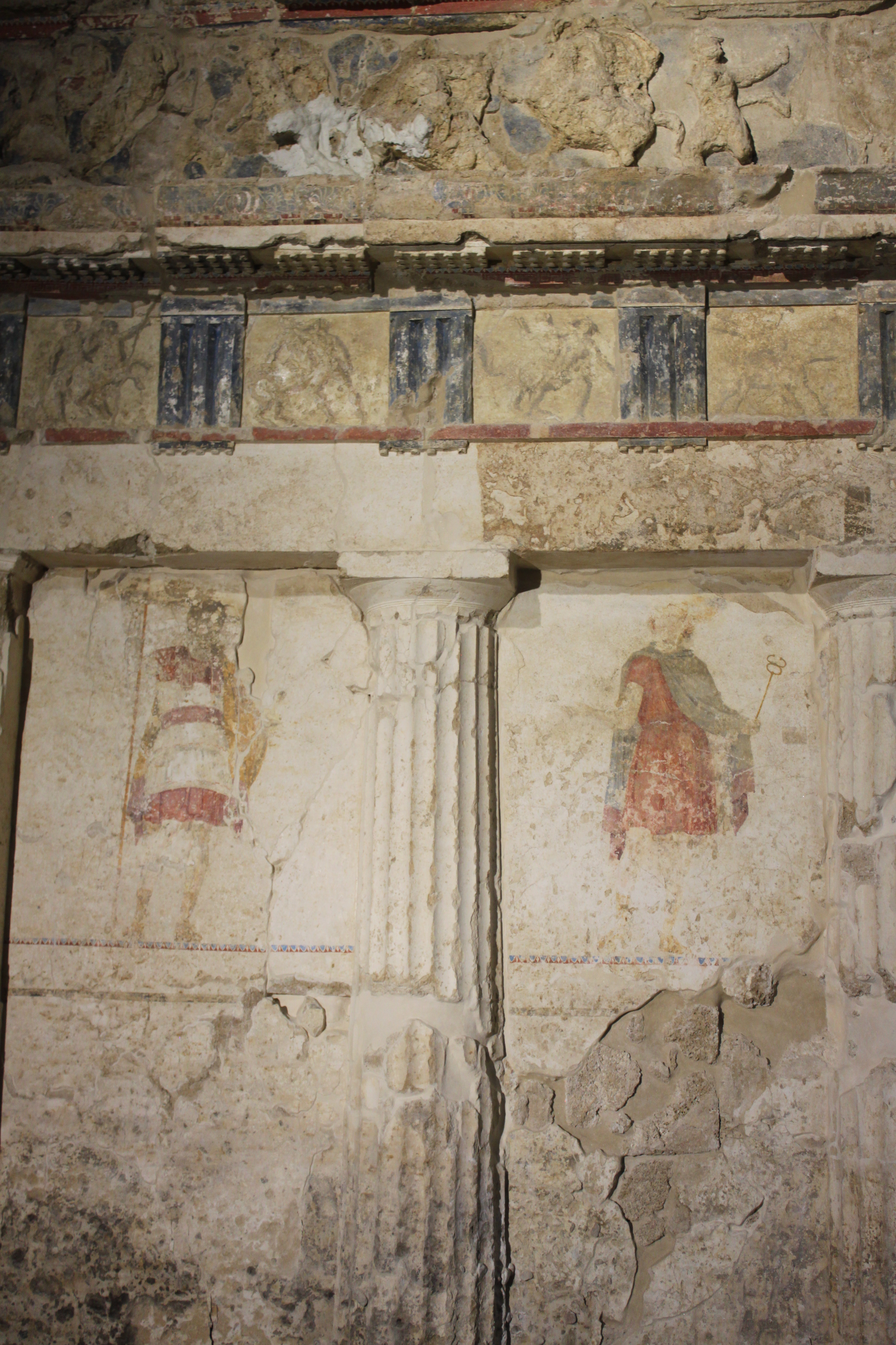 Panneau gauche de la façade de la tombe du jugement